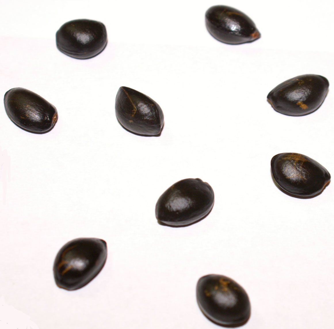 Annona × atemoya seeds